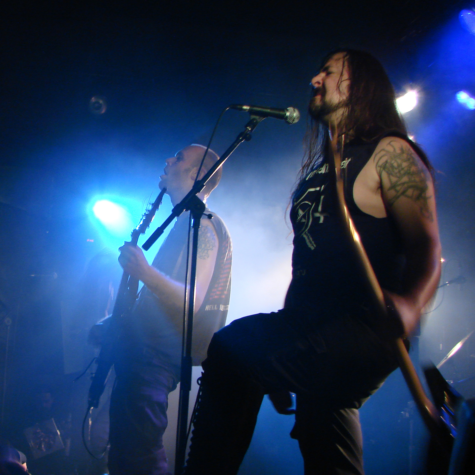 Arkhon Infaustus en concert au Nouveau Casino à Paris, le 28/04/08.